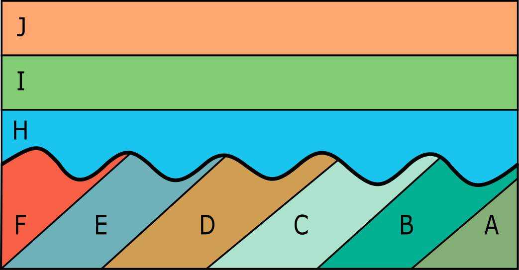 una secuencia de estratos antiguo que fue expuesta a un periodo de erosión visible, se pliega o inclina y se superpone sobre ella, una secuencia de estratos más joven con un ángulo de buzamiento diferente.